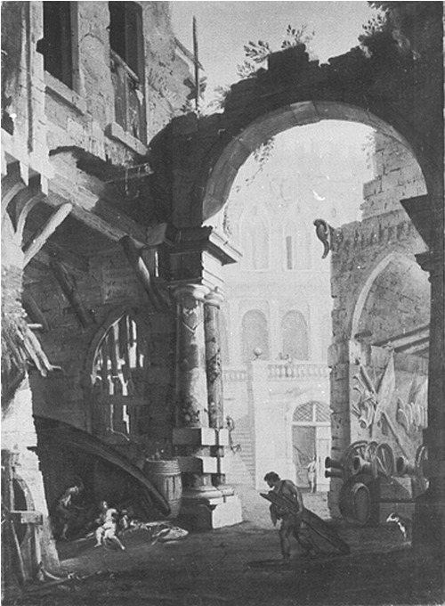 Architekturstück. Dresden, Staatliche Kunstsammlungen Dresden, Gemäldegalerie Alte Meister, Inv.-Nr. 462